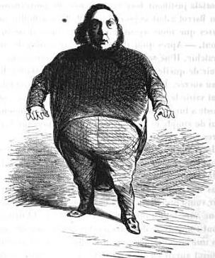 Caricature de Léon François Jean de Maleville en 1848-49, par Cham.